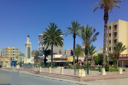 " الخصة " أحد رموز مدينة جرسيف